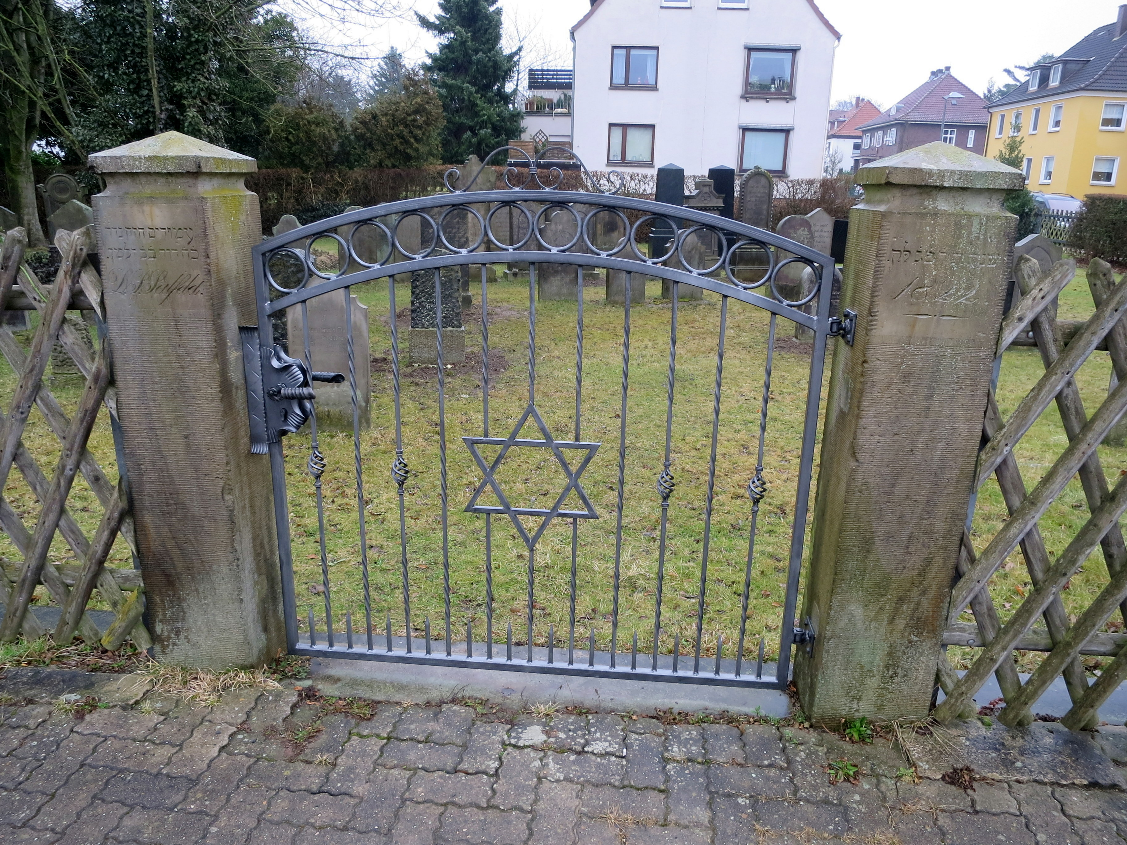 Ein jüdischer Friedhof aus dem 19. Jahrhundert in Stadthagen, der seit kurzem wieder belegt ist.